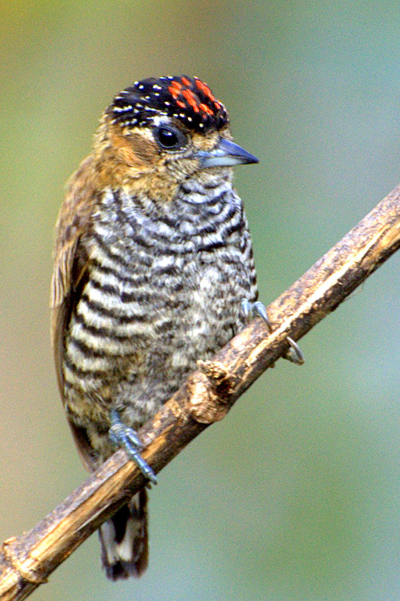 Picumnus temminckii